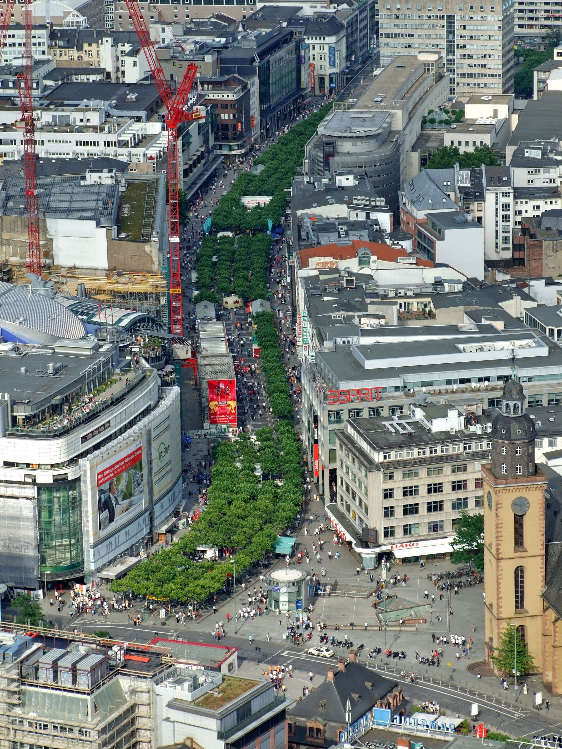 Die Zeil in Frankfurt am Main, zwischen Hauptwache und Konstabler Wache